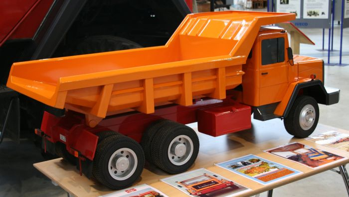 Delta-Projekt Muldenkipper von Magirus-Deutz im Modell (im Vordergrund zeigt eine Abbildung die Frontansicht)